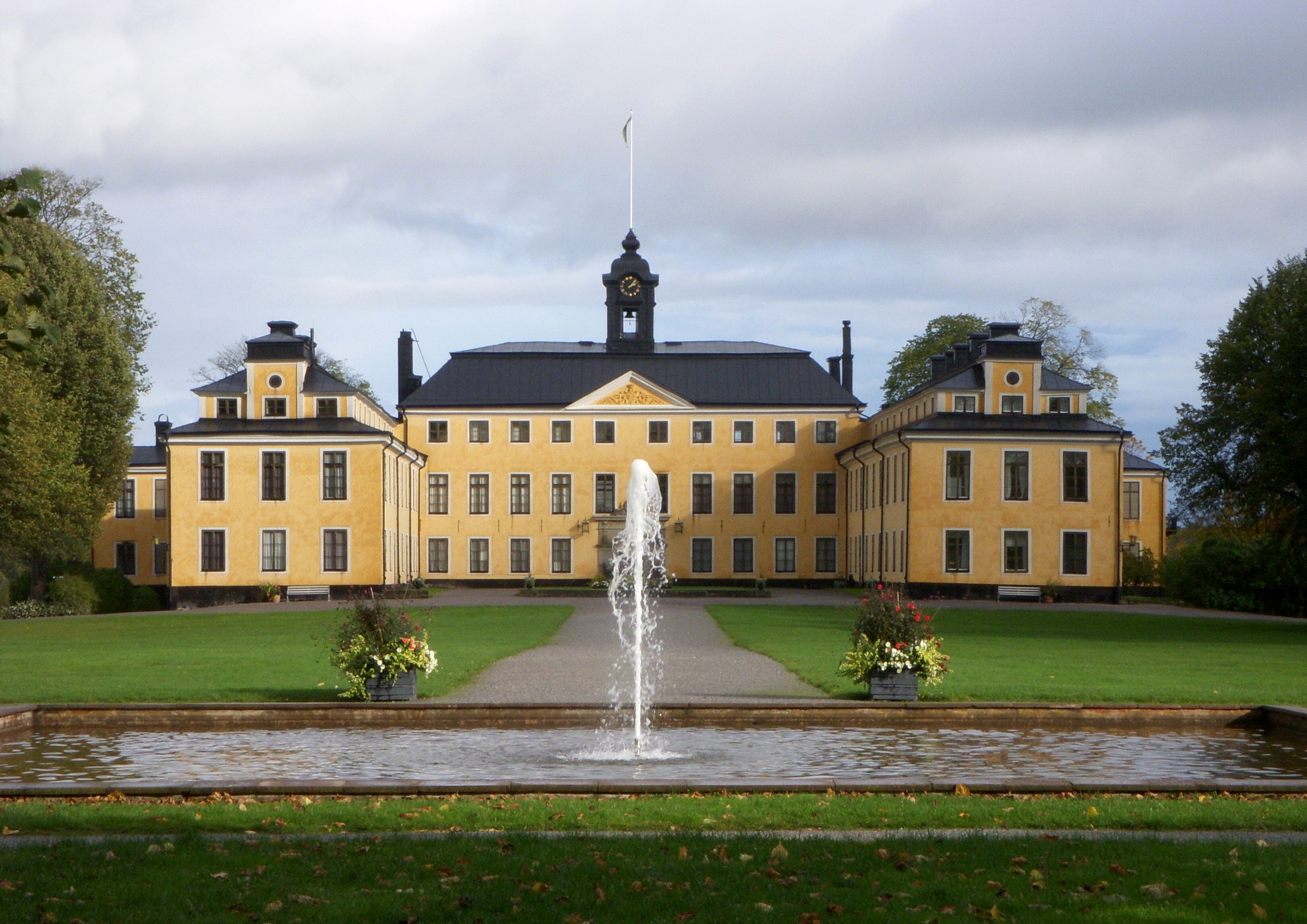 Ulriksdals slott mot väst